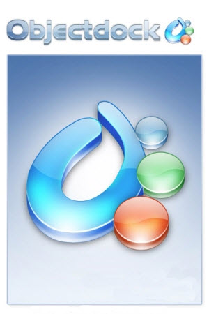 Logo de ObjectDock